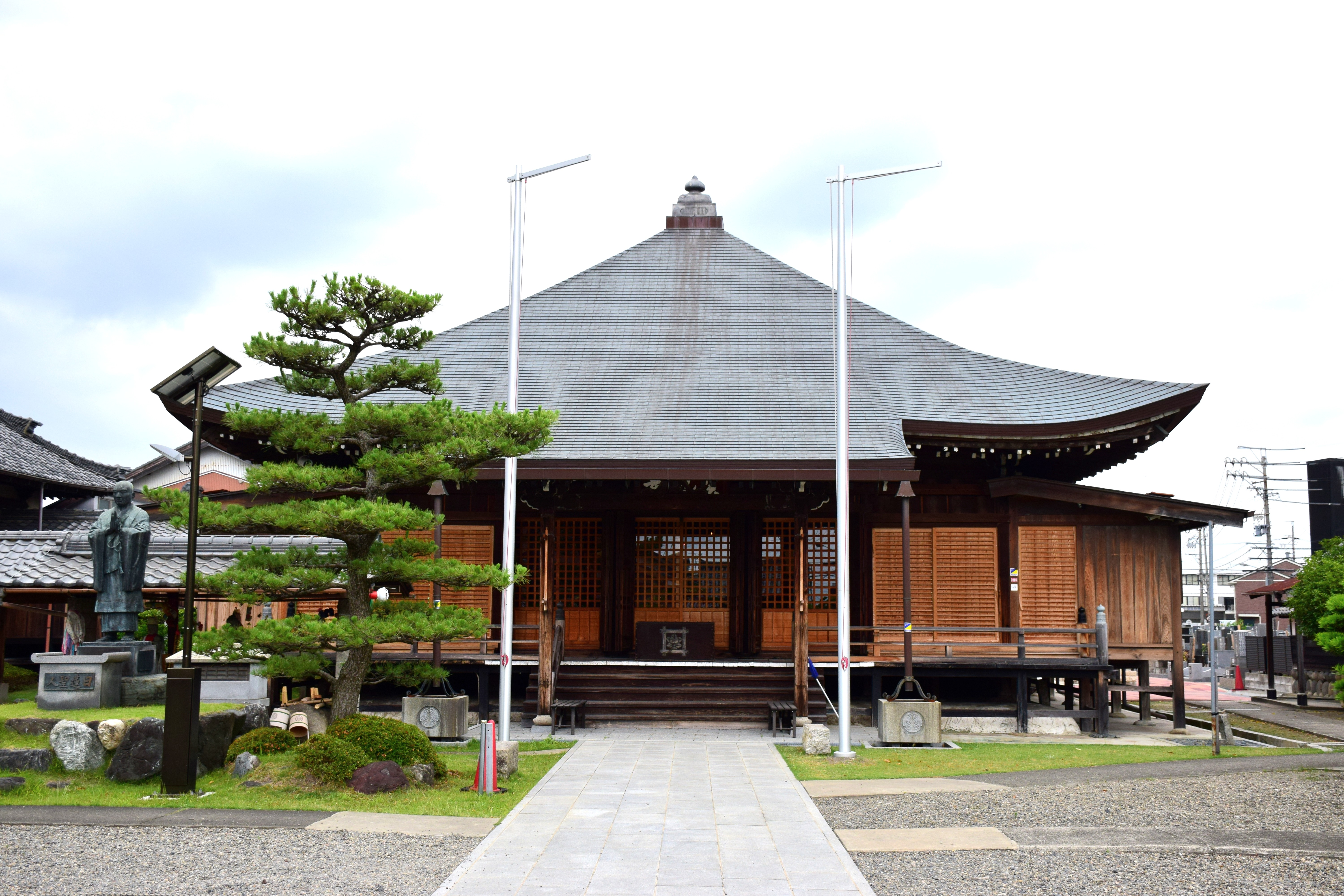 實成寺本堂